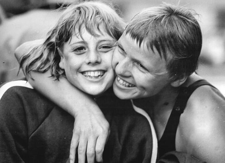 Martina Grunert, Zentralbild Kluge Sche 15.8.1968 Leipzig: Deutsche Meisterschaften der DDR im Schwimmen-Martina Grunert wieder gut in Schwung Ein ebenso erfolgreiches wie erfreuliches Comeback feierte Martina Grunert (SC DHfK Leipzig,links), die Europameisterin von 1966 über 100 m Freistil. Nachdem sie länger als ein Jahr verletzt gewesen war und erst in diesem Jahr wieder mit dem Training begonnen hatte, holte sie sich nun mit 1:01,4 min ihren zweiten Titel über die Sprintstrecke der Frauen. Die Zeit, nur 0,2 s über ihrem in Utrecht erzielten DDR-Rekord, machte deutlich, daß Martina zur rechten Zeit den Anschluß wieder geschafft hat. Auch die Zweite, die als Favoritin gestartete Uta Schmuck (SC Karl-Marx-Stadt,rechts), empfahl sich mit 1:01,7 min für die 4x100 m Kraulstaffel zu den Olympischen Sommerspielen in Mexico.